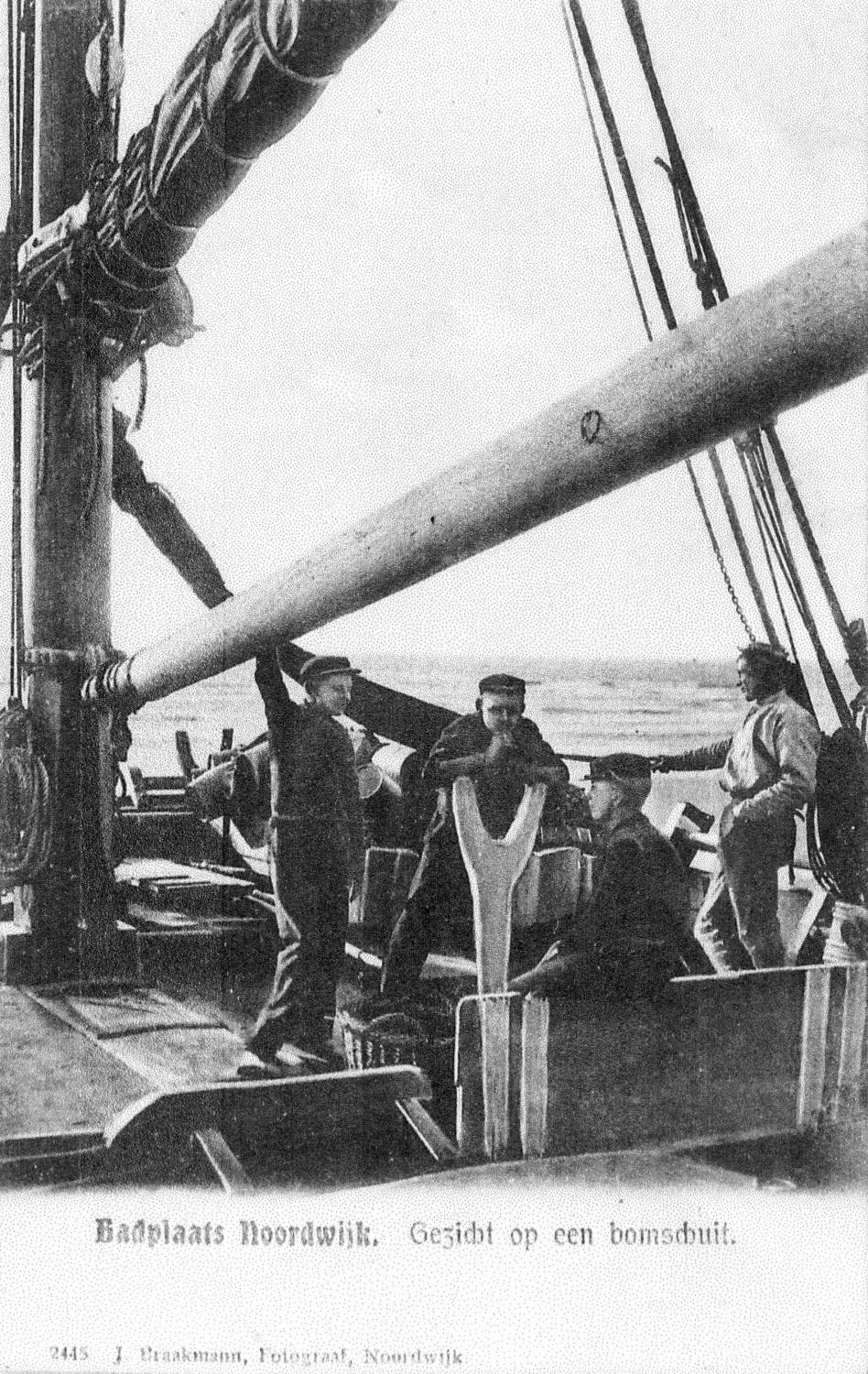 Gezicht op bomschuit, Noordwijk